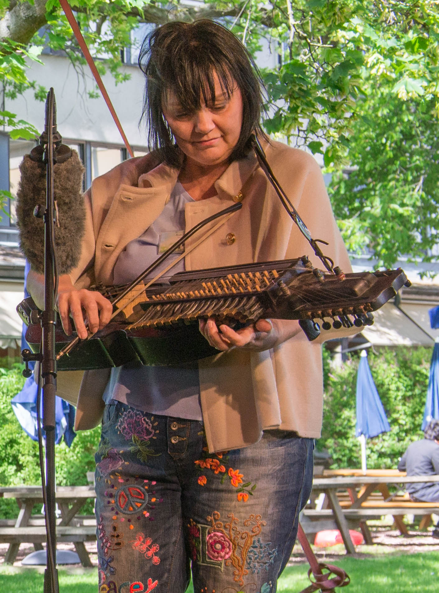 Åsa Jinder som en av Sommarpratarna i P1 på presskonferensen i Radiohusets trädgård den 3 juni 2015.